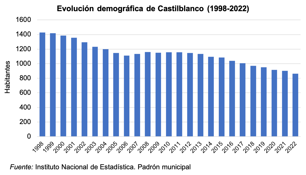 Población de Castilblanco (Badajoz), (1998-2009).